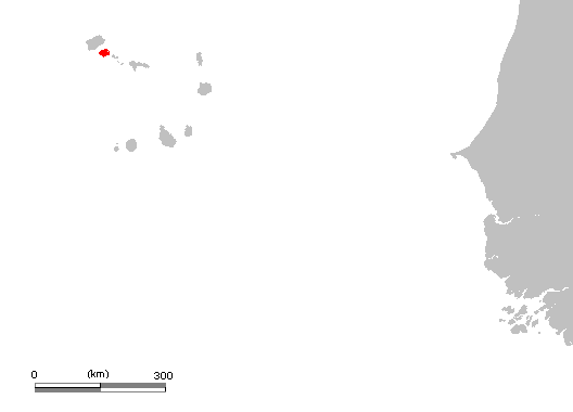 CV Sao Vincente.PNG (Cape Verde)